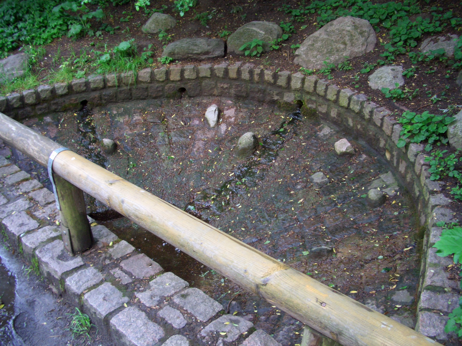 Die Osterquelle östlich von Berlin-Lübars im Bezirk Reinickendorf. Die letzte freisprudelnde Quelle Berlins liefert an einer Schichtgrenze zwischen Lehm und Kies sieben Liter Wasser pro Sekunde mit einer durchschnittlichen Temperatur von 9 °C.